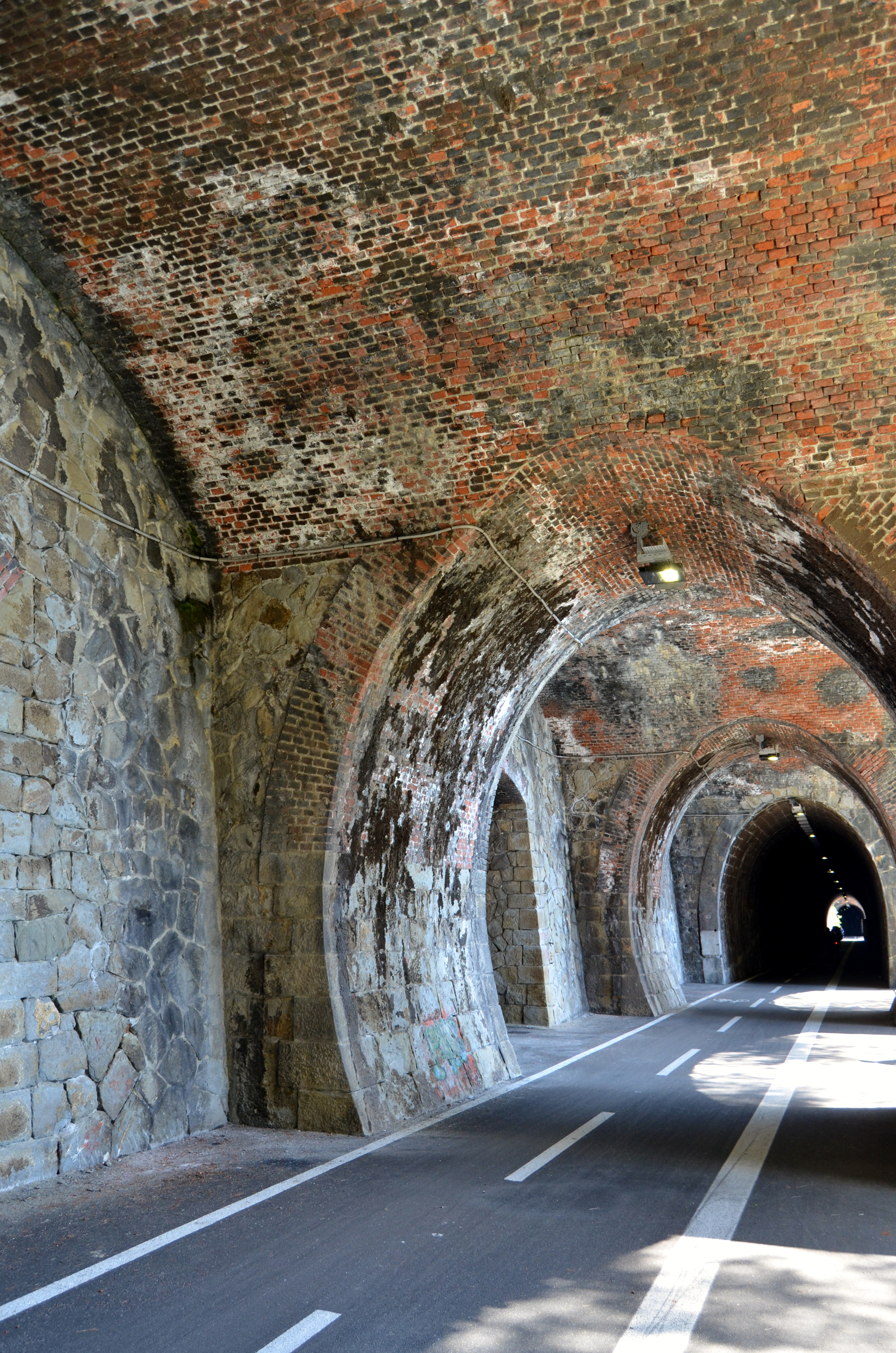 Pista ciclabile tra i comuni di Framura e Bonassola, Liguria, Italia